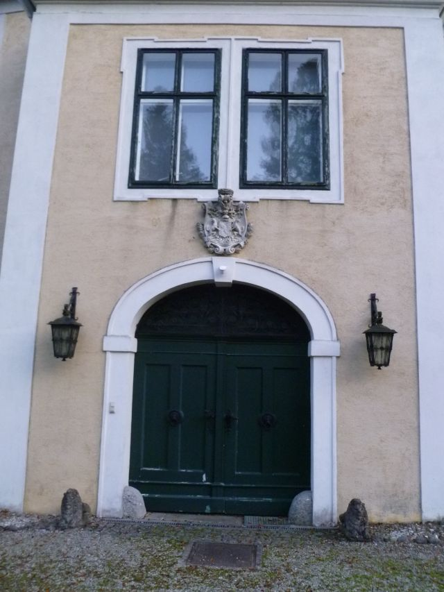 Schloss Wimsbach Eingangsportal